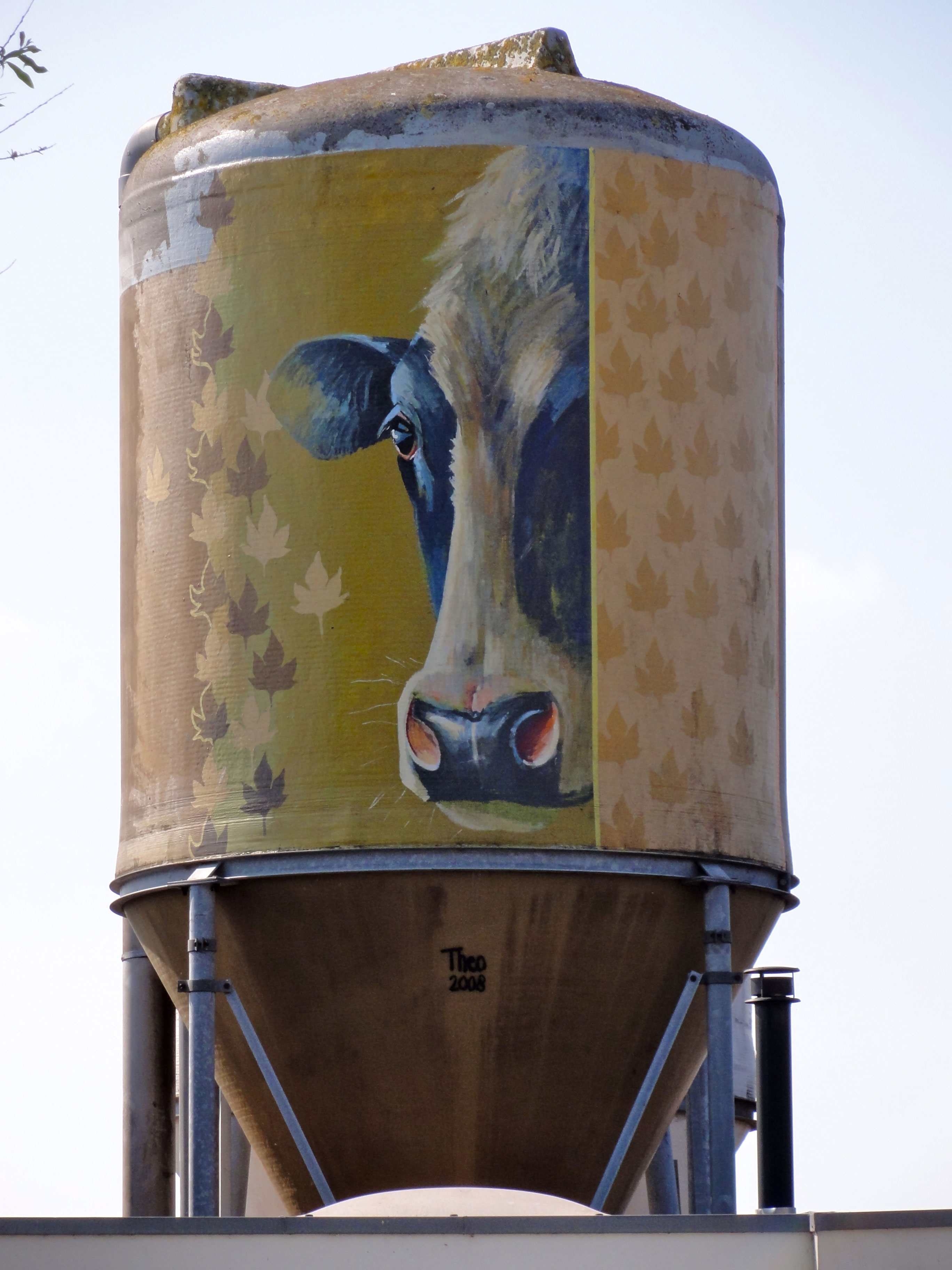 Schildering van een silo in het kader van het project "Kunst in de polder" Schiermonnikoog